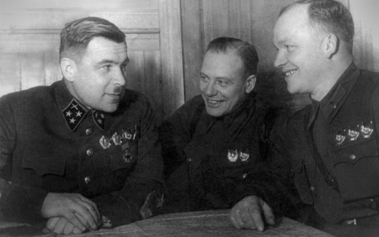 Западный фронт. Можайское направление. Командующий 5-й армией генерал-лейтенант артиллерии Леонид Александрович Говоров (слева). Справа - член Военного совета армии бригадный комиссар Павел Филатович Иванов